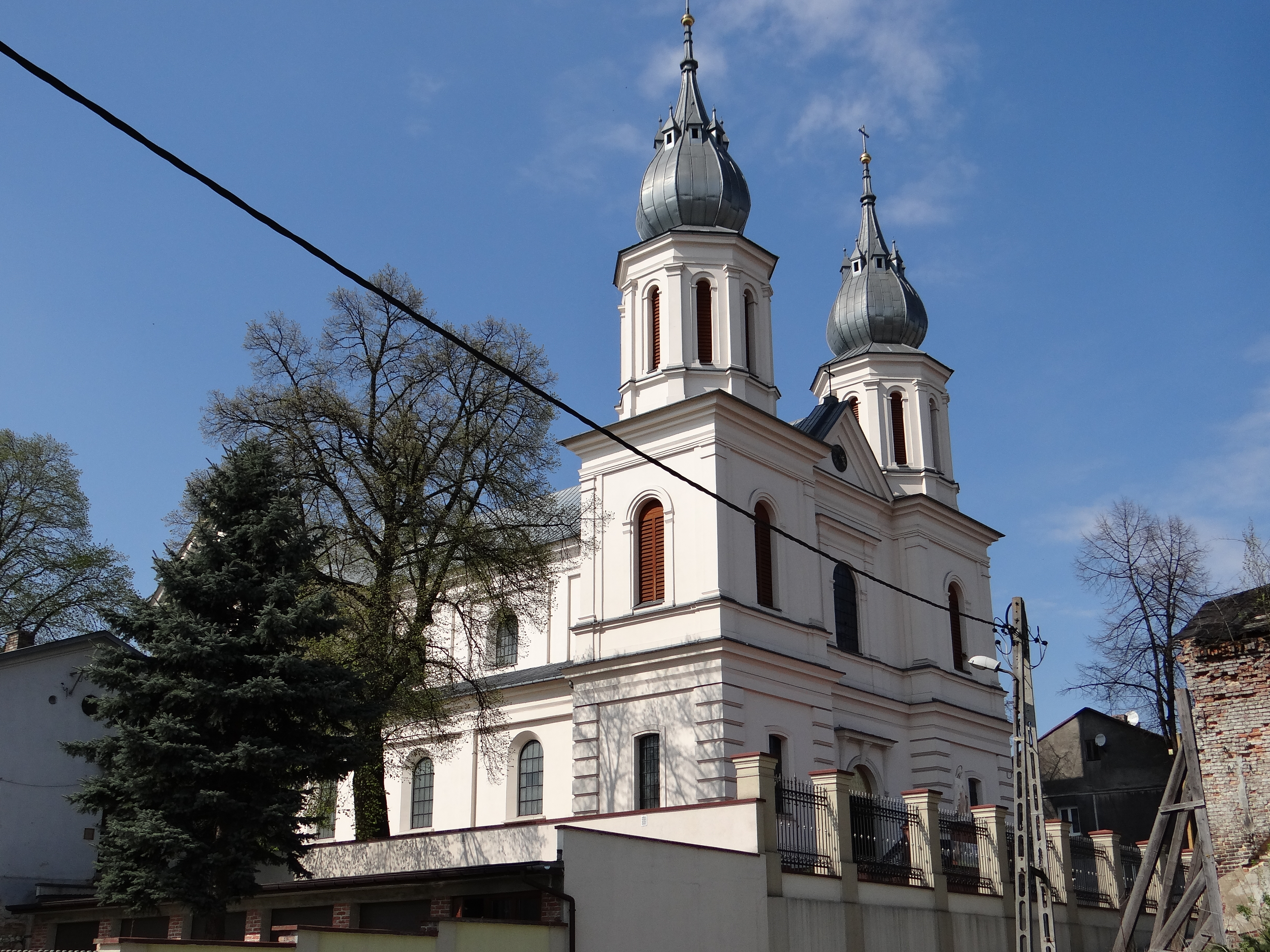 Słomniki, zespół kościoła par. pw. Bożego Ciała, 2 poł. XIX, XX